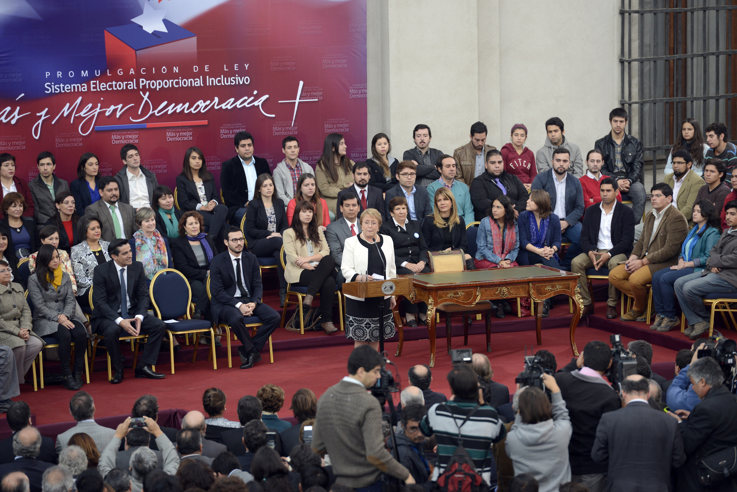 Ministro Álvaro Elizalde asiste a ceremonia de Promulgación de Ley de Sistema Electoral Proporcional Inclusivo.